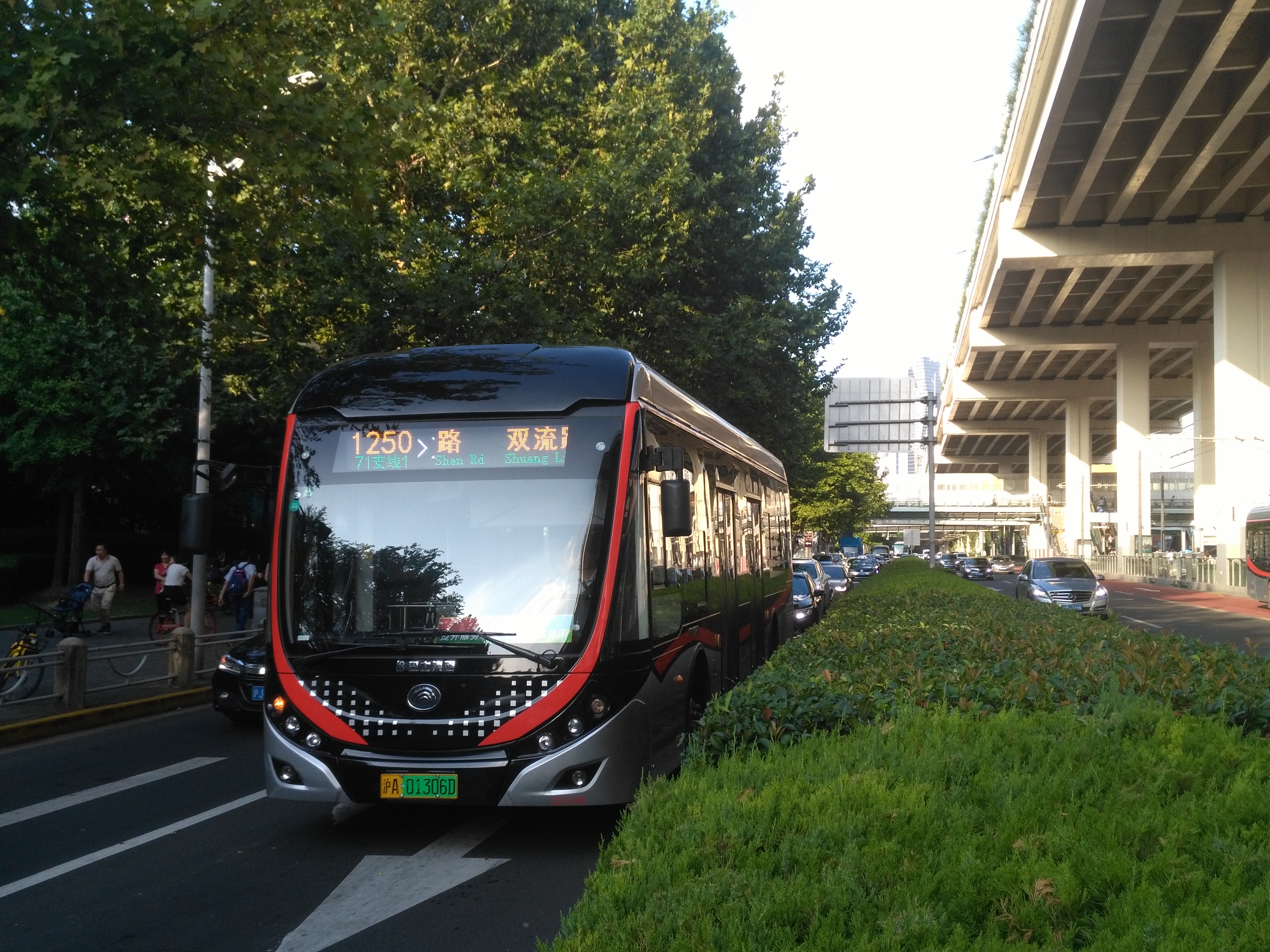 上海公交1250路（71路支线1）正在延安西路天山路口准备右转。